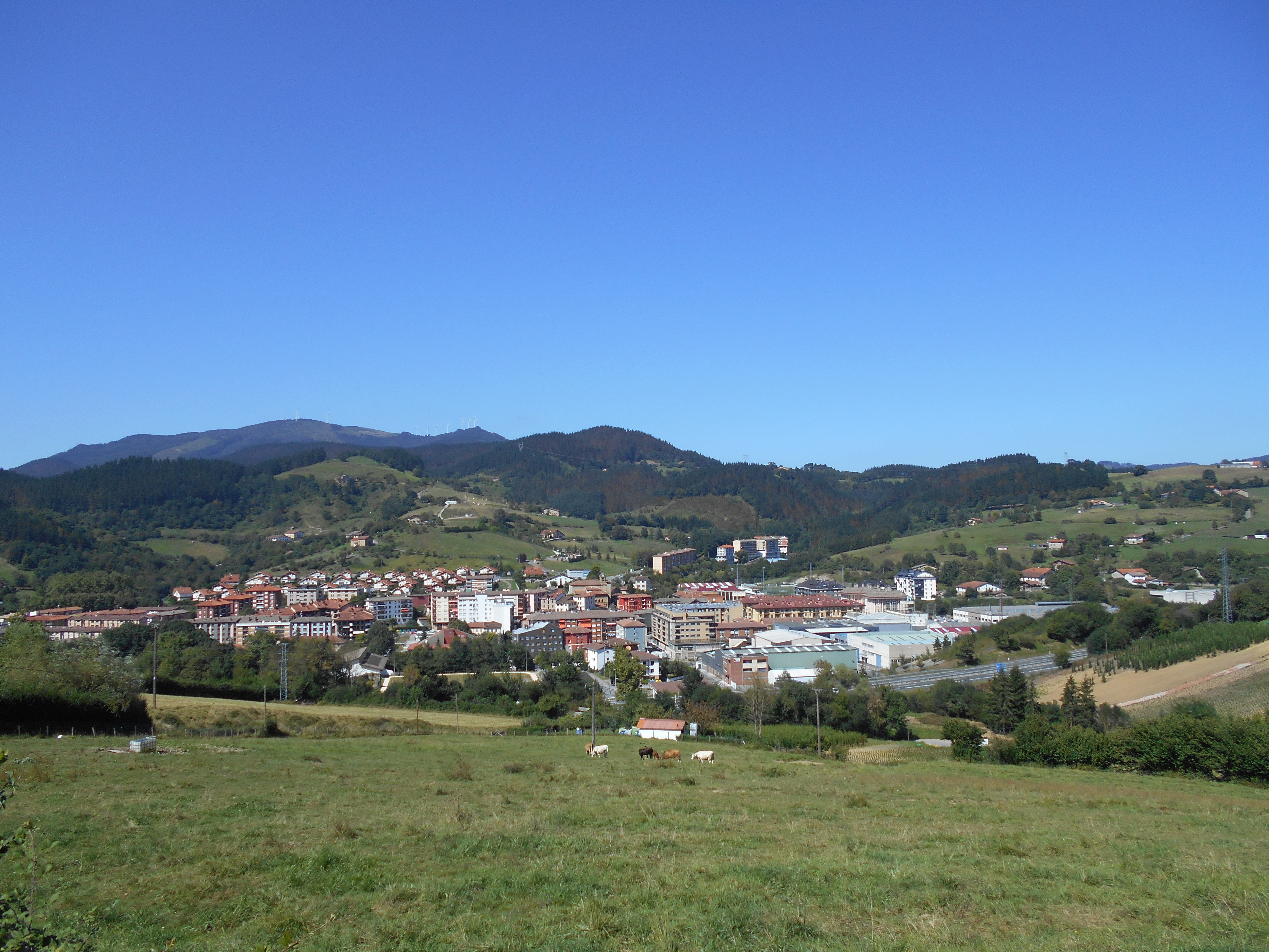 Vista de Zaldibar en el valleEuskara: Zaldibar eta bere harana